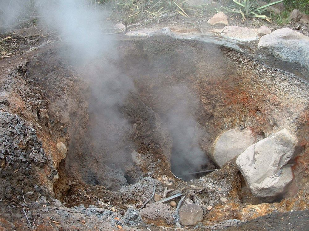 Fumerole at Rincón de la Vieja Volcano National Park, Costa Rica